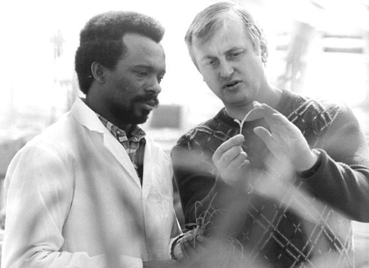 Leipzig, Universität, Agrarwissenschaft ADN-ZB Grubitzsch 26.4.84 Bez. Leipzig: Ausbildung von Agrarexperten-Experimentelle Untersuchungen nehmen Bernadino Silva von Sao Tome und Principe und Oberassistent Dr. Jürgen Pohlen in der Lehr- und Versuchsstation des Instituts für Tropische Landwirtschaft der Karl-Marx-Universität Leipzig in Liebertwolkwitz vor. Die Einrichtung hat seit mehr als zwei Jahrzehnten hervorragenden Anteil an der Ausbildung von Agrarexperten aus Afrika, Asien und Lateinamerika. Bisher erwarben hier 259 junge Bürger aus 53 Ländern ihren Hochschulabschluß. Zur Zeit belegen 73 Studenten aus 24 Ländern die Hörsäle des Instituts. - siehe auch 1984-0426-7N